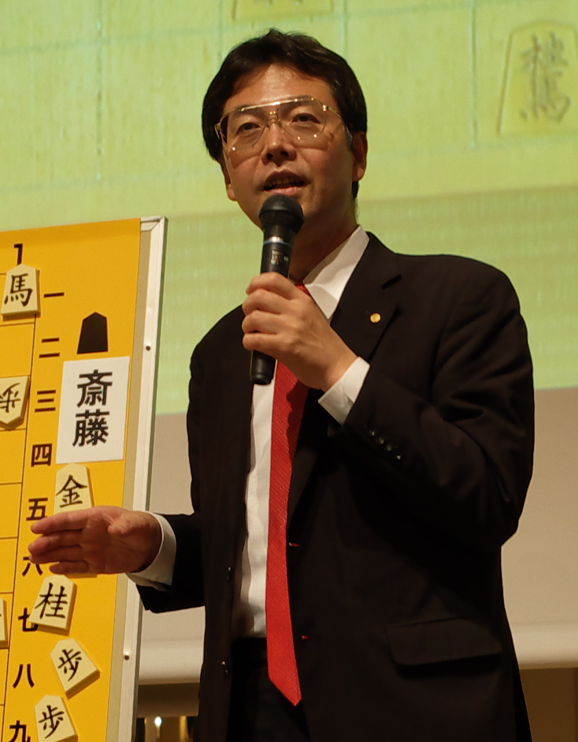 森下卓九段（日本将棋連盟常務理事）。2018年10月2日、第66期王座戦五番勝負第3局 大盤解説会にて。